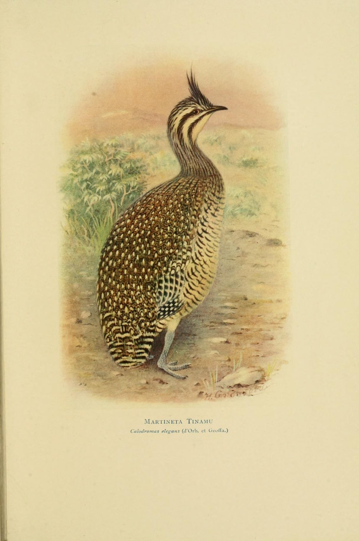 J.-^^J- Martineta Tin am u Culodromas elegans (il'Orb. ul Gcoira.)